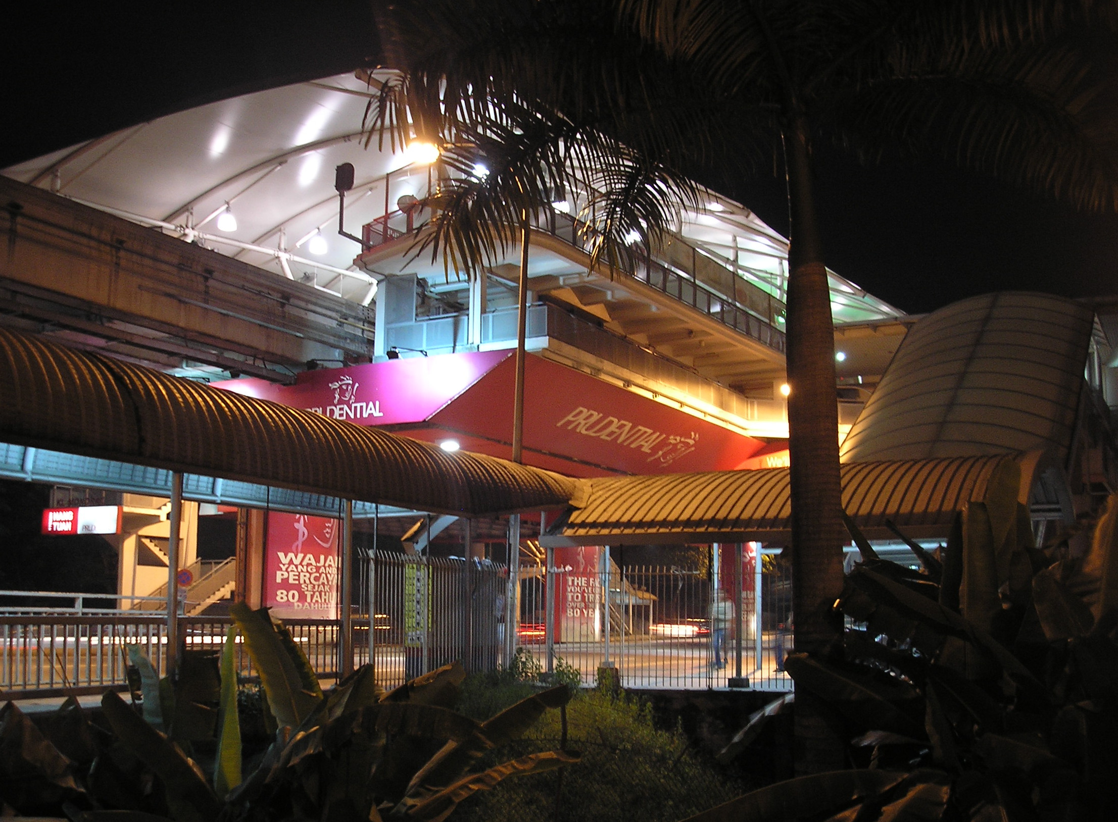 The Hang Tuah station (Kuala Lumpur Monorail) (exterior), Kuala Lumpur, Malaysia.